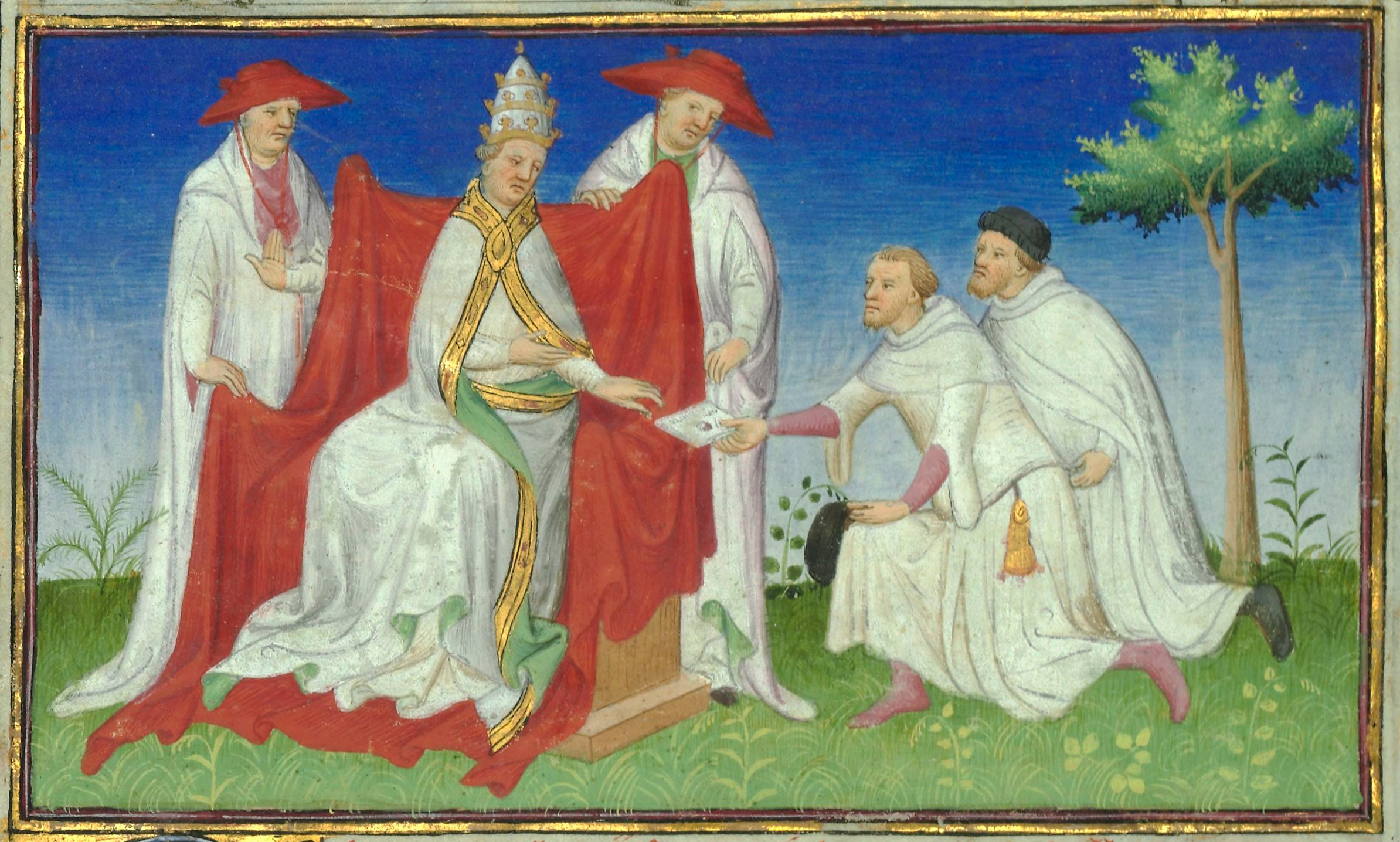 Noccolo And Maffeo Polo With GregoryX From "Le livre des Merveilles du Monde"